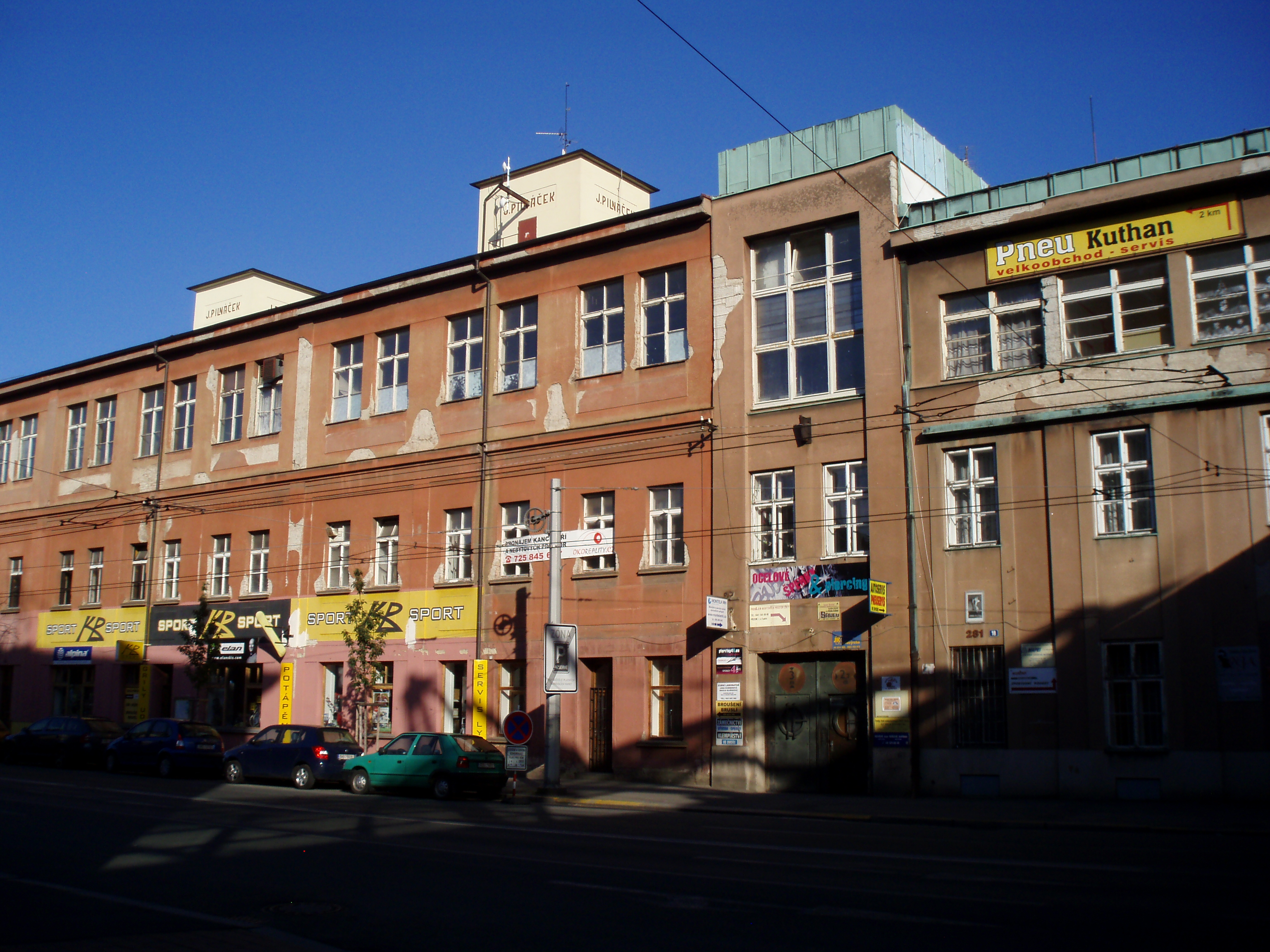 Pilnáčkova továrna (Hradec Králové)